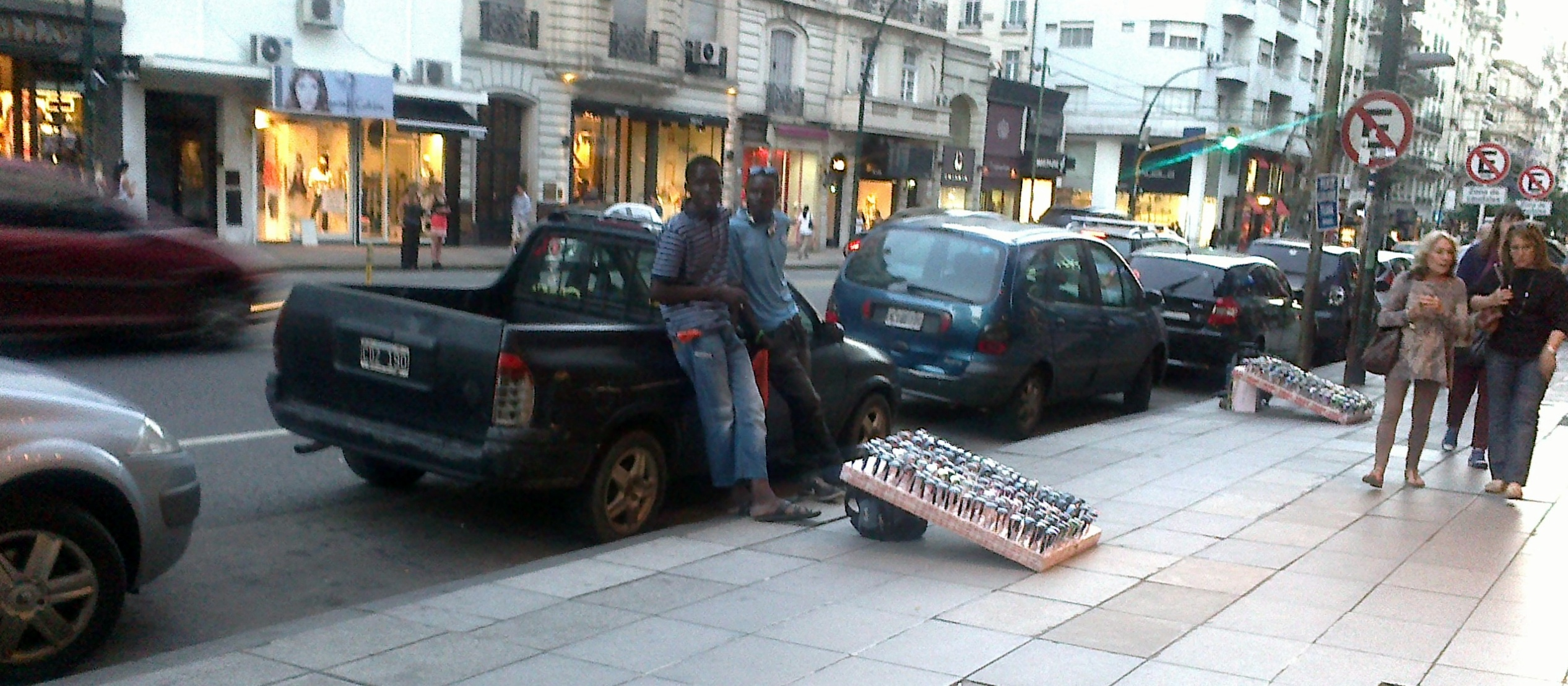 Vendedores africanos sobre Avenida Santa Fe.